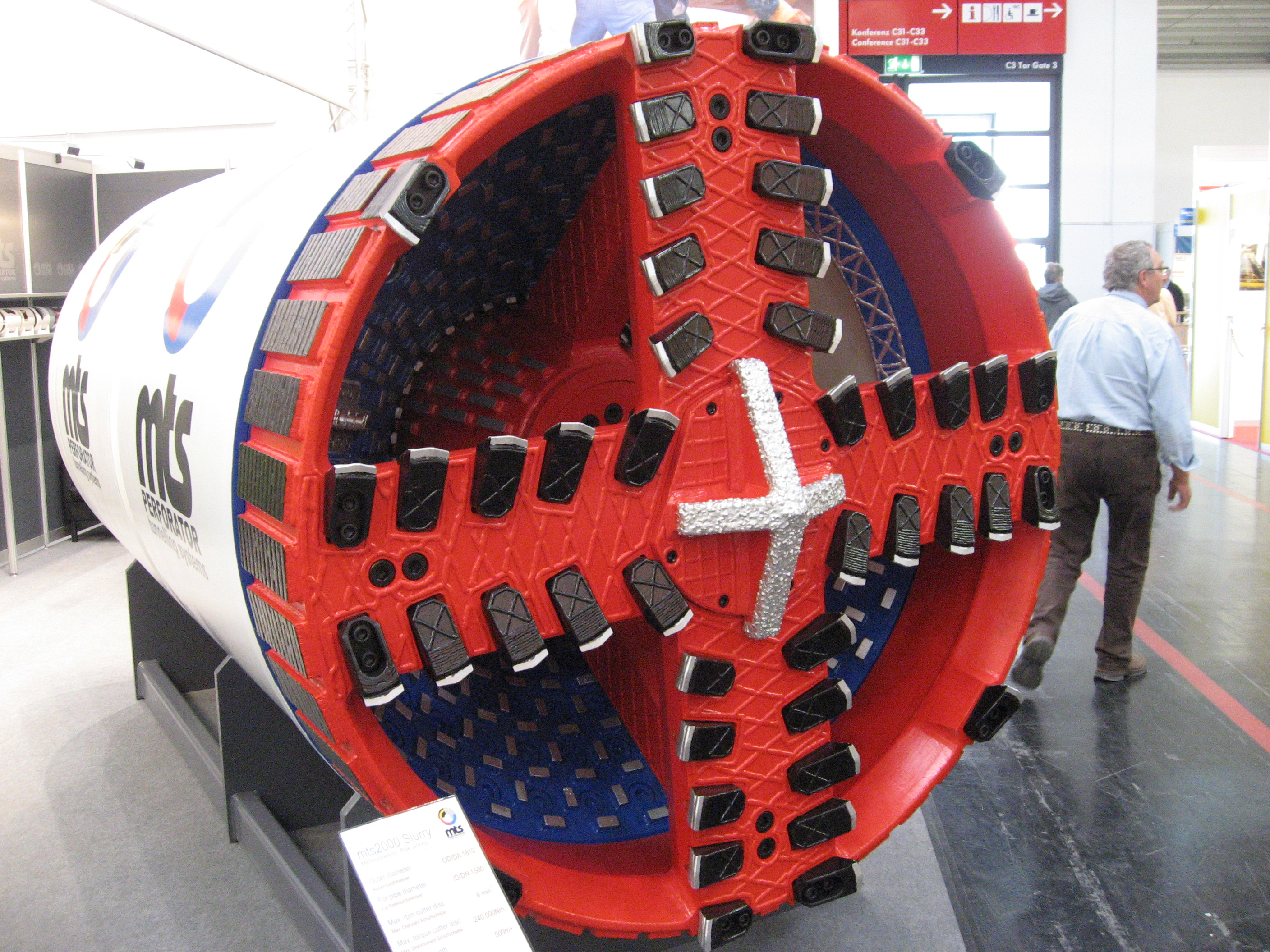 MTS Perforator Tunnelbohrmaschine aufgenommen auf bauma 2010 in München